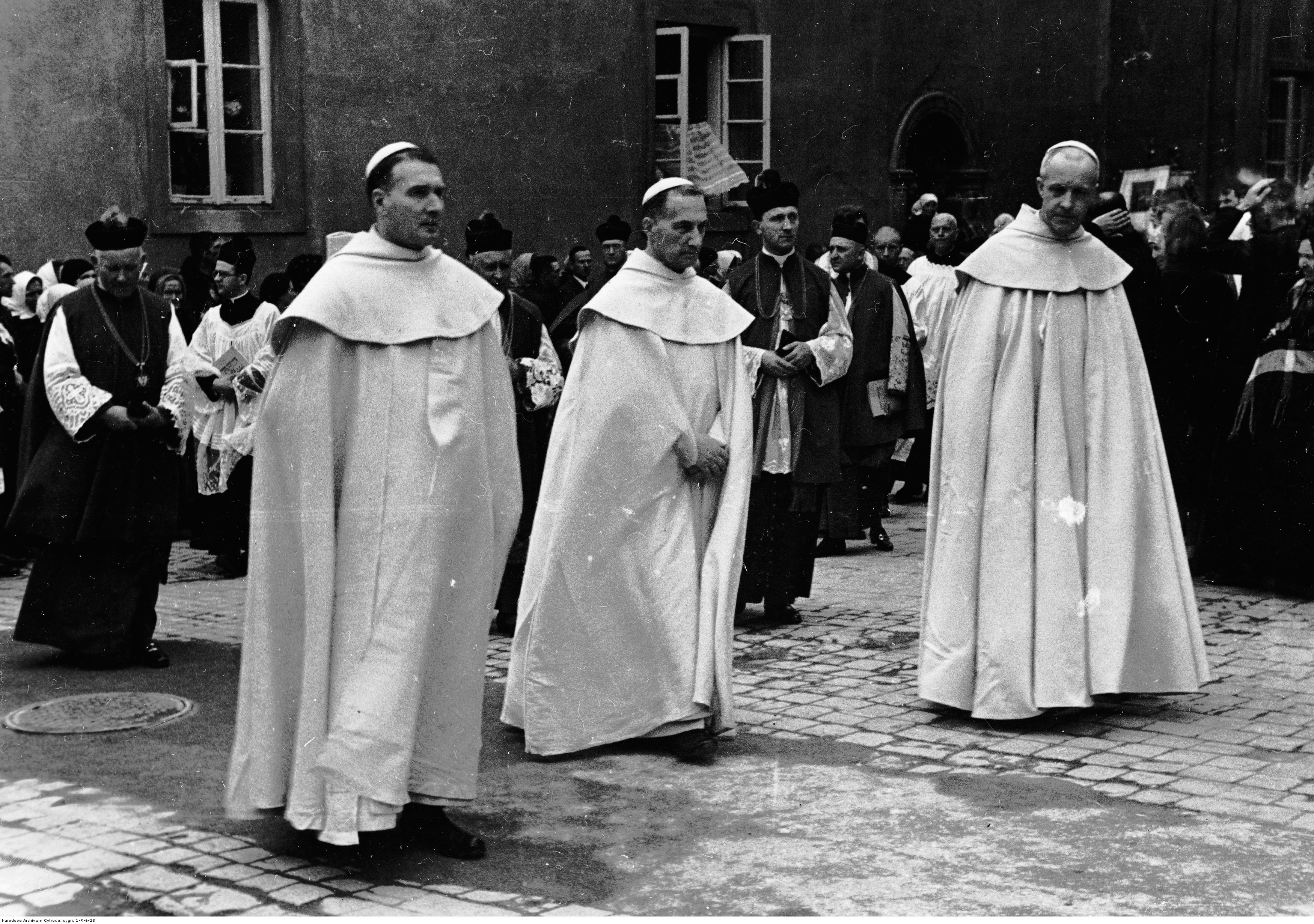 Ojcowie paulini podczas procesji: przeor klasztoru na Jasnej Górze o. Norbert Motylewski (pierwszy z lewej) oraz generał Zakonu Paulinów o. Pius Przeździecki